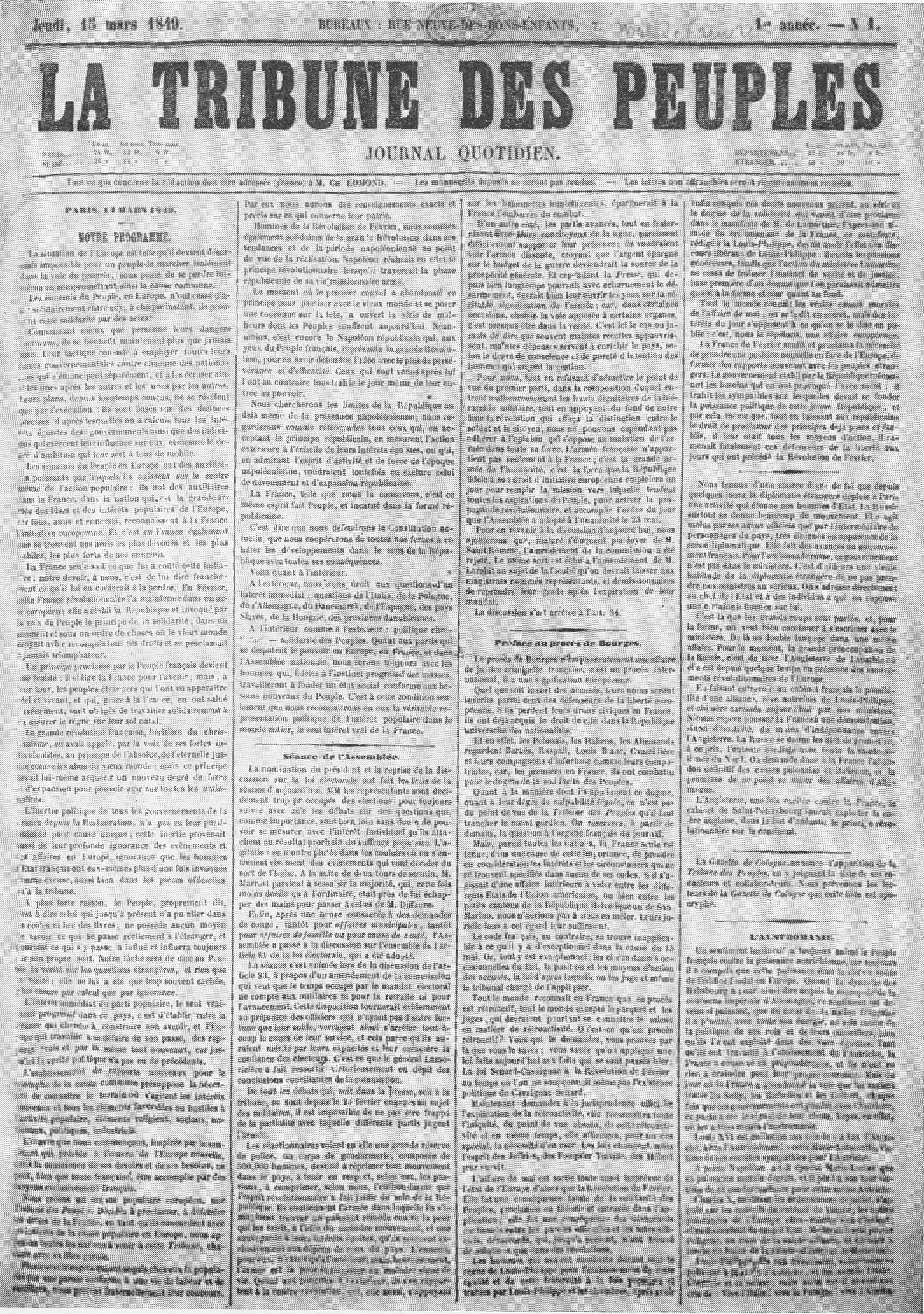 Zdjęcie gazety Trybuna Ludu założonej przez A. Mickiewicza w 1849